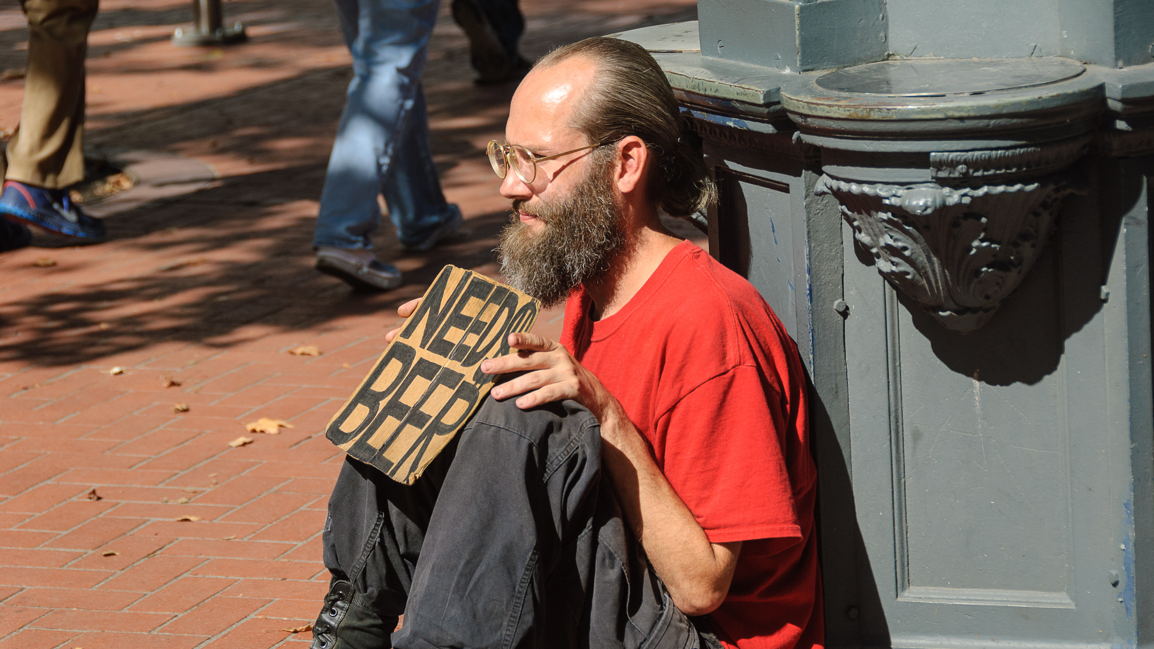 Needs Beer